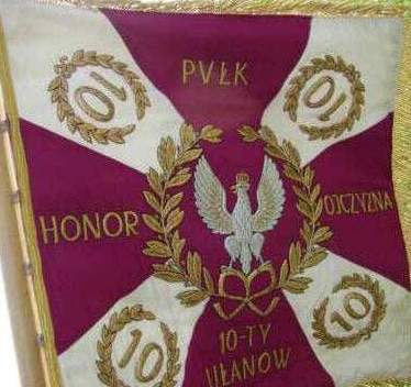 Sztandar 10 Pułku Ułanów Litewskich (strona lewa)